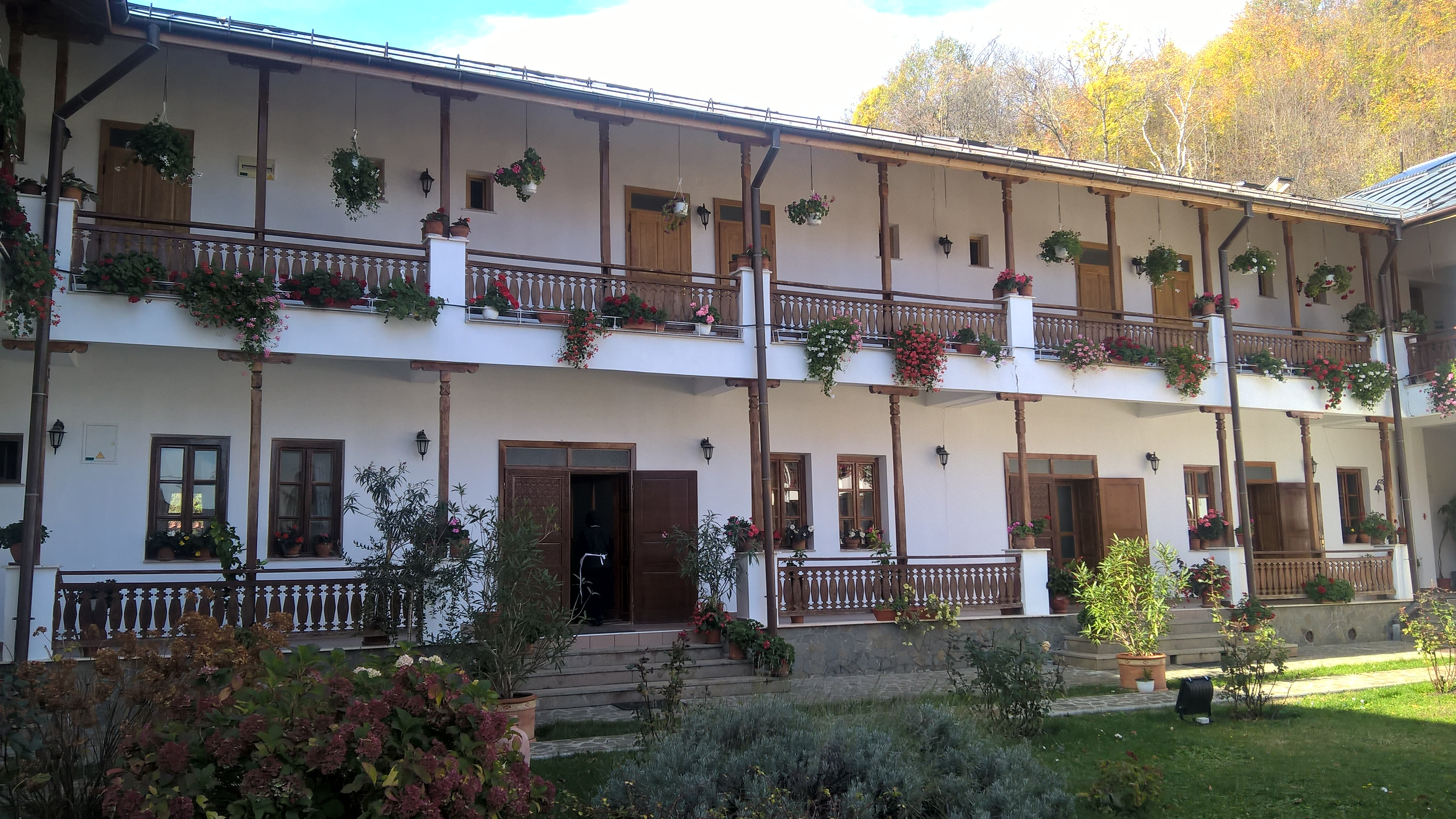 Mănăstirea Arnota, Corp chilii 02